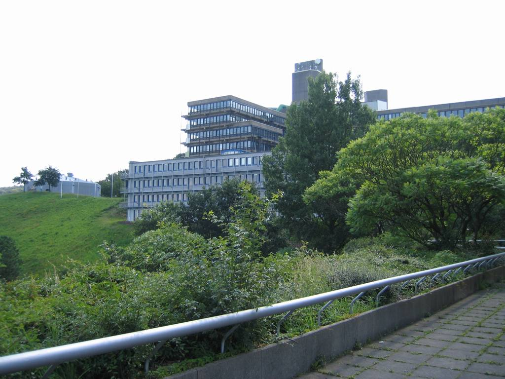 Beschreibung: Wuppertaler Universität, Sommer 2004 Quelle: Benutzer:JensD Lizenz: GNU-FDL